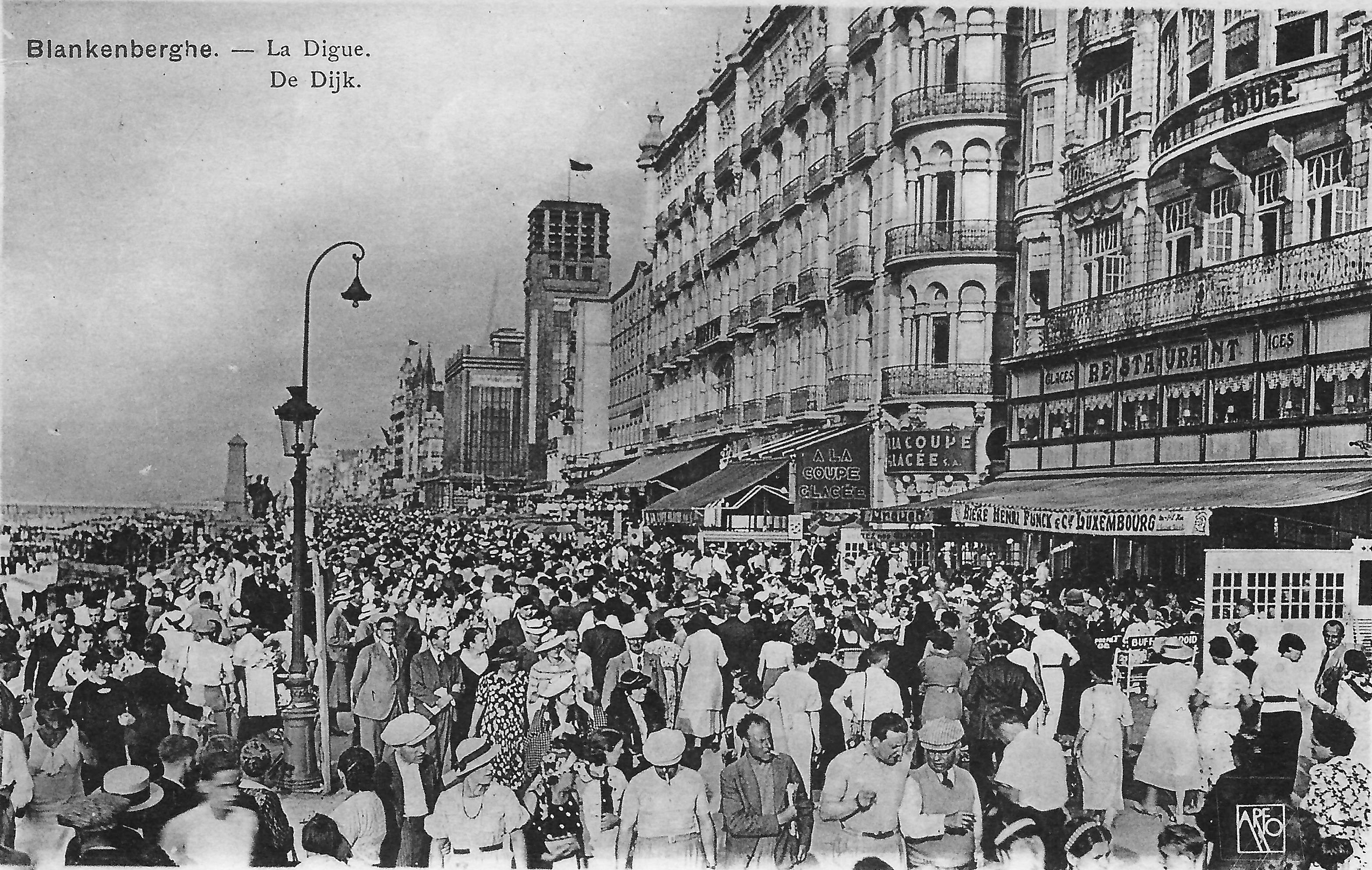 Zomerdrukte langs de promenade in Blankenberge in de jaren 1920